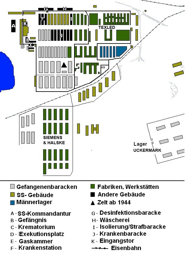 Karte des Konzentrationslagers Ravensbrück mit Siemenslager und Konzentrationslager Uckermark, Landkreis Templin, Provinz Brandenburg